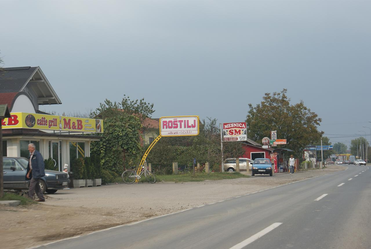 Laktasi September 2008